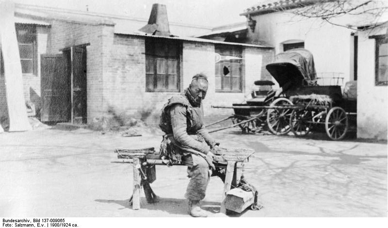 China, Peking, Messer-Schleifer